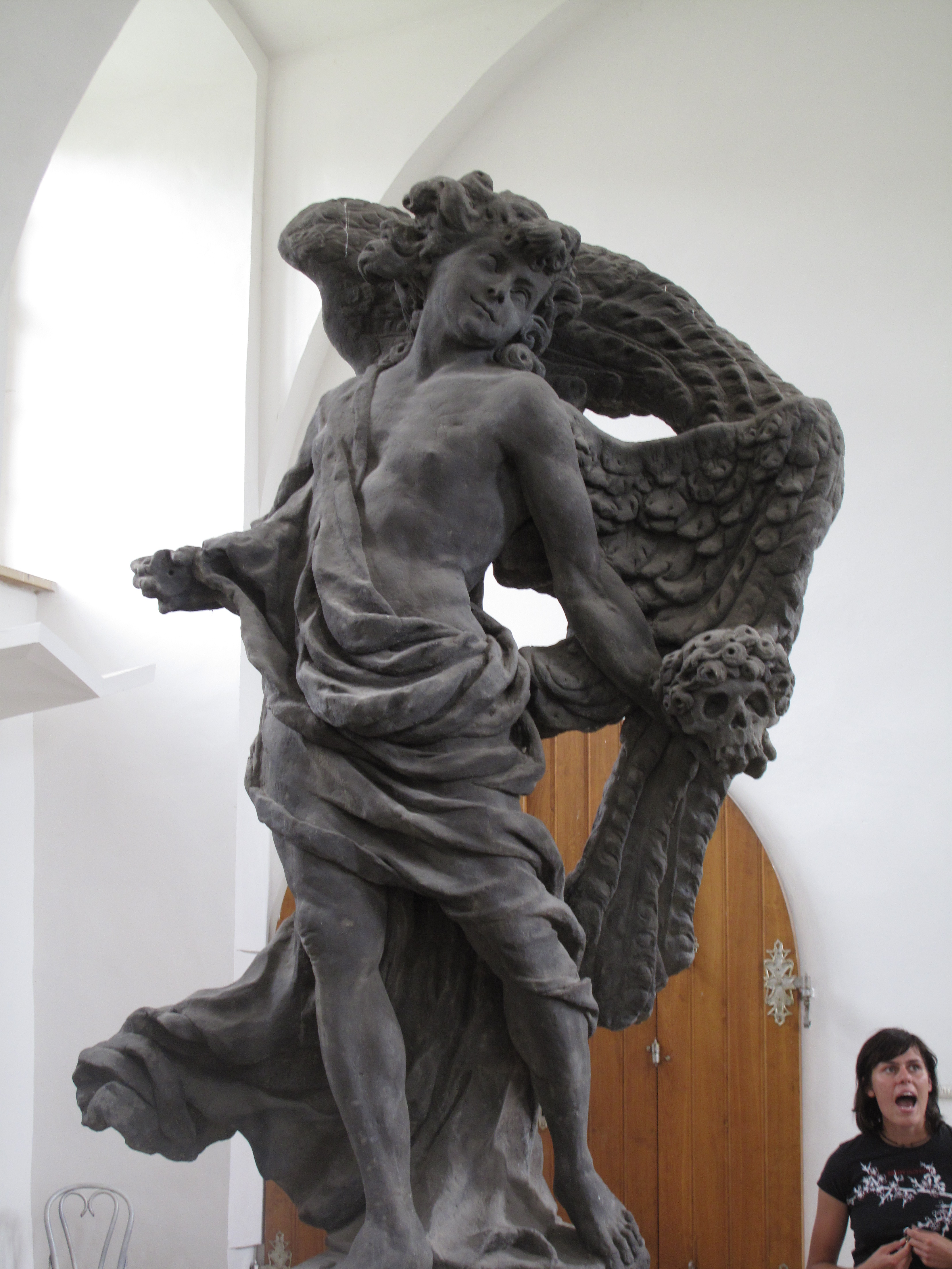 Matyáš Bernard Braun, Anděl blažené smrti - originál lapidárium Kuks